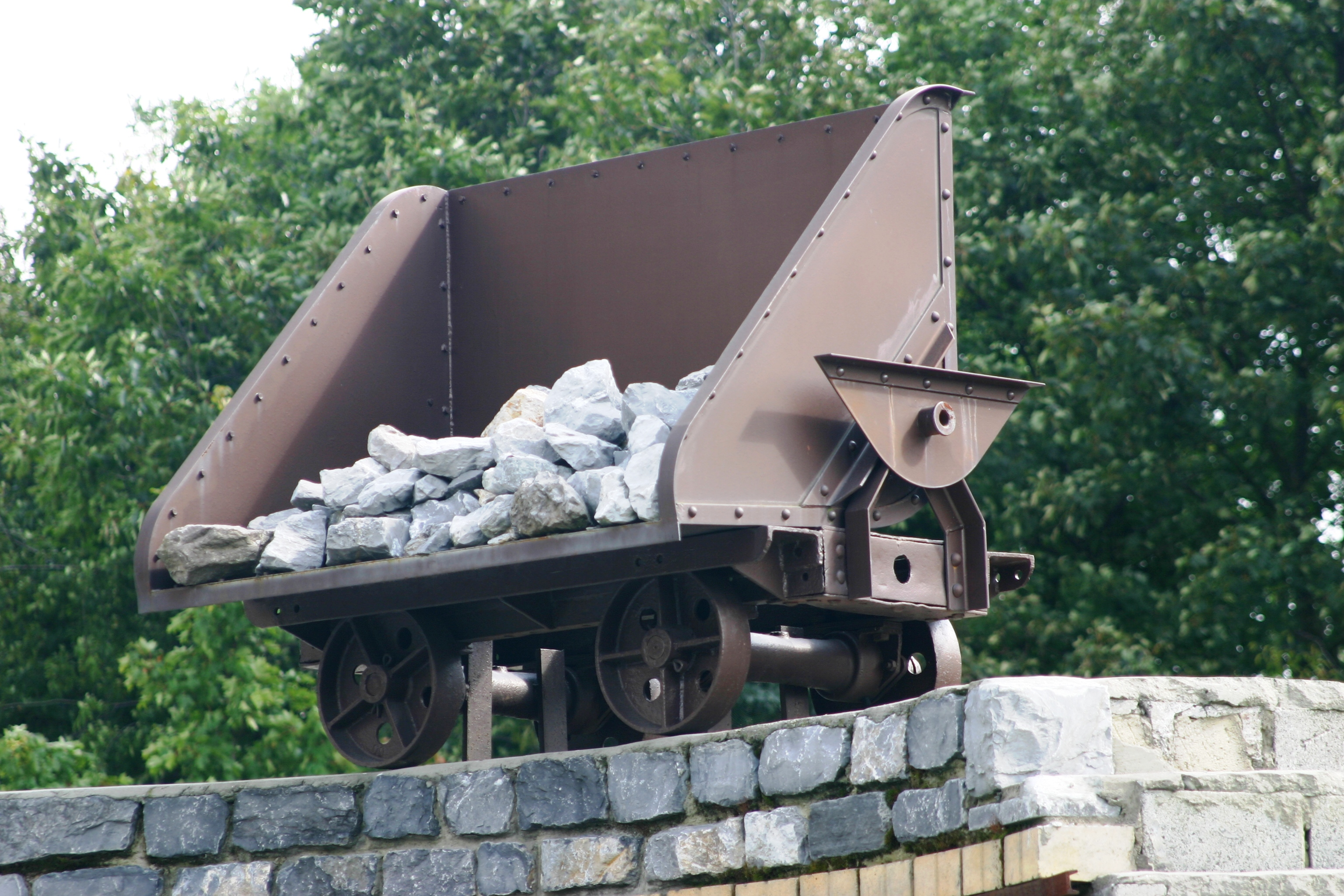 E Buggi op der Mauer vun der Rekonstrukioun vum Kalleksuewen zu Saint-Georges-sur-Meuse. Kategorie:Transportmëttelen